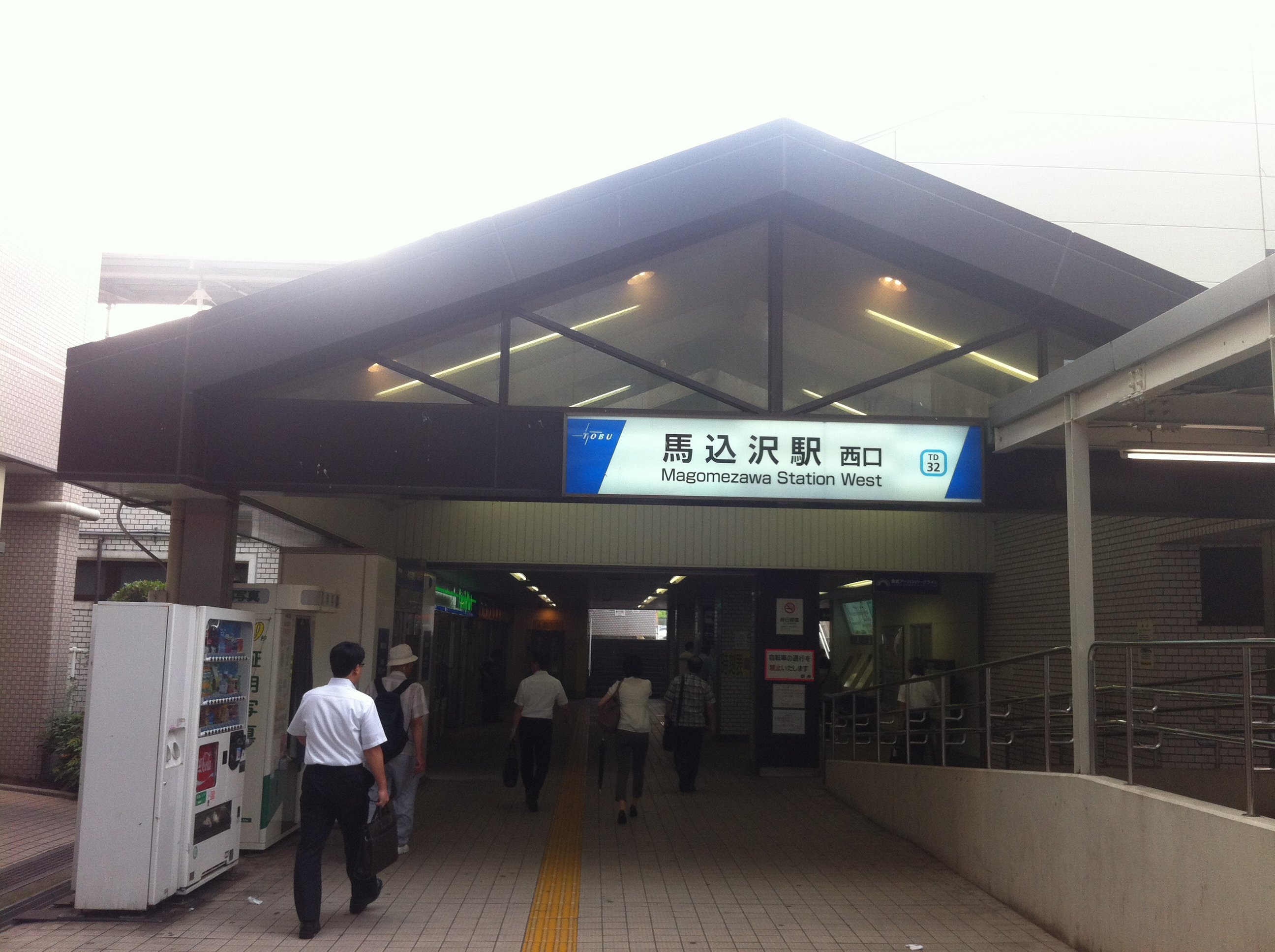 馬込沢駅の西口 Magomezawa, west exit